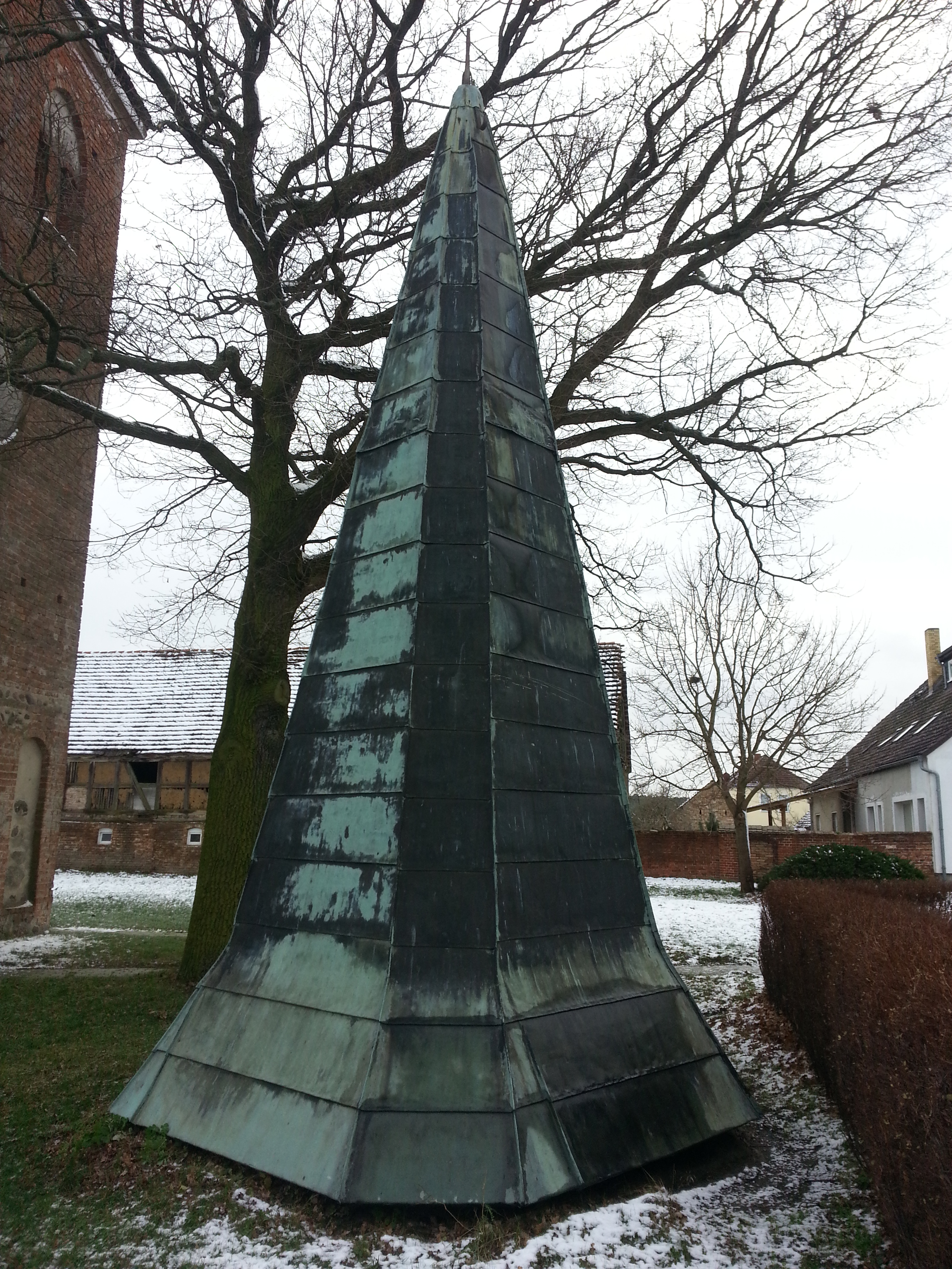 dachreiter der dorfkirche marzahne